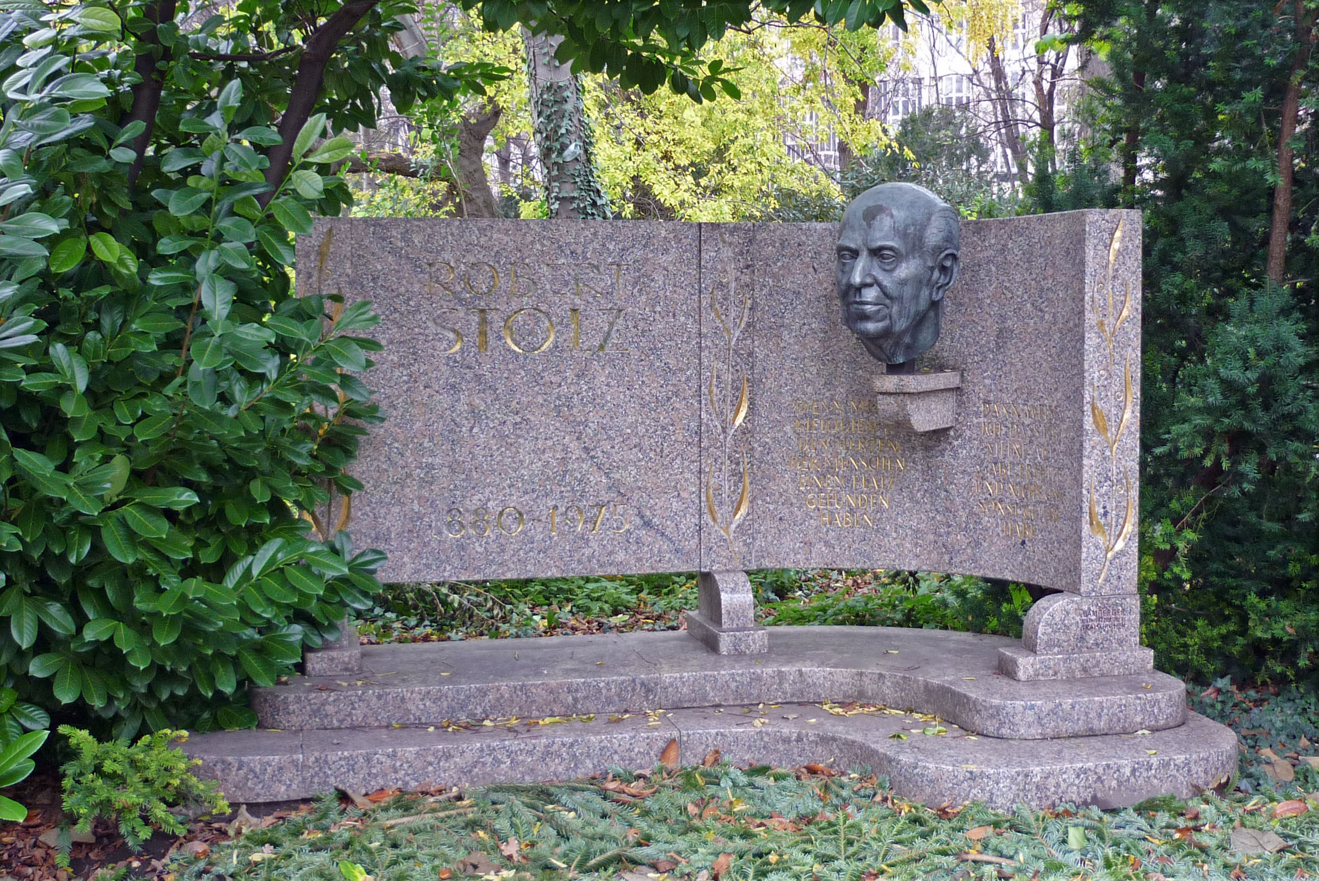 Robert-Stolz-Denkmal im Stadtpark in Wien